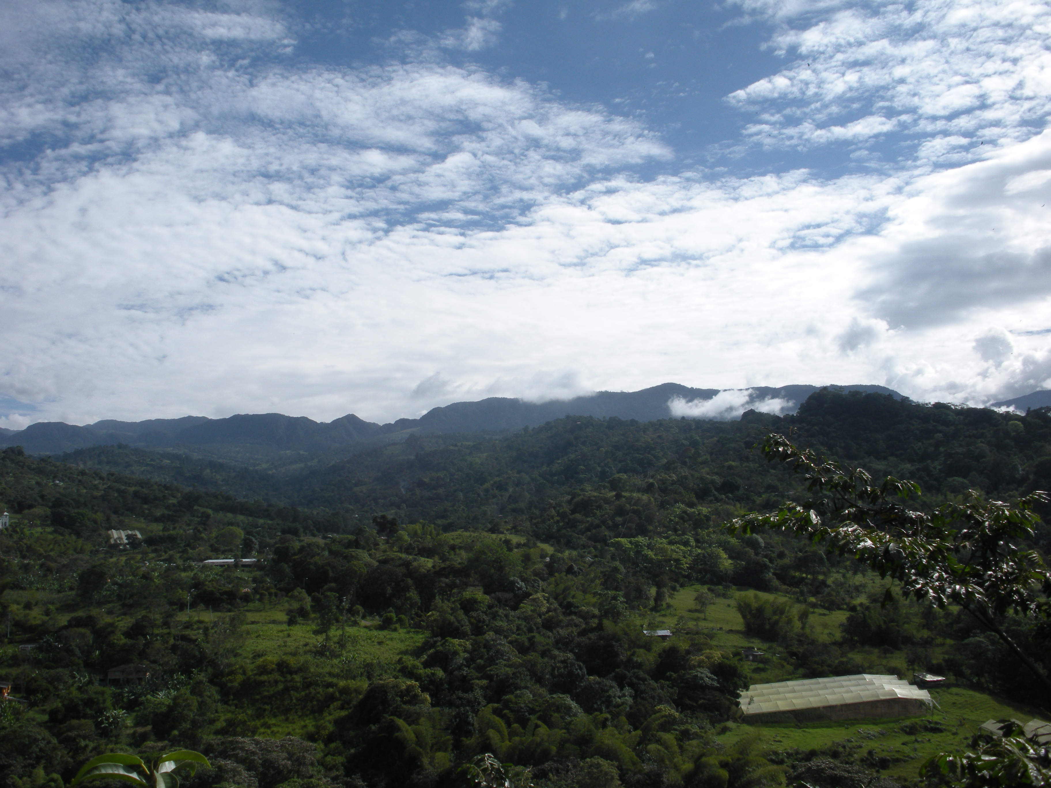 Silvania, Colombia